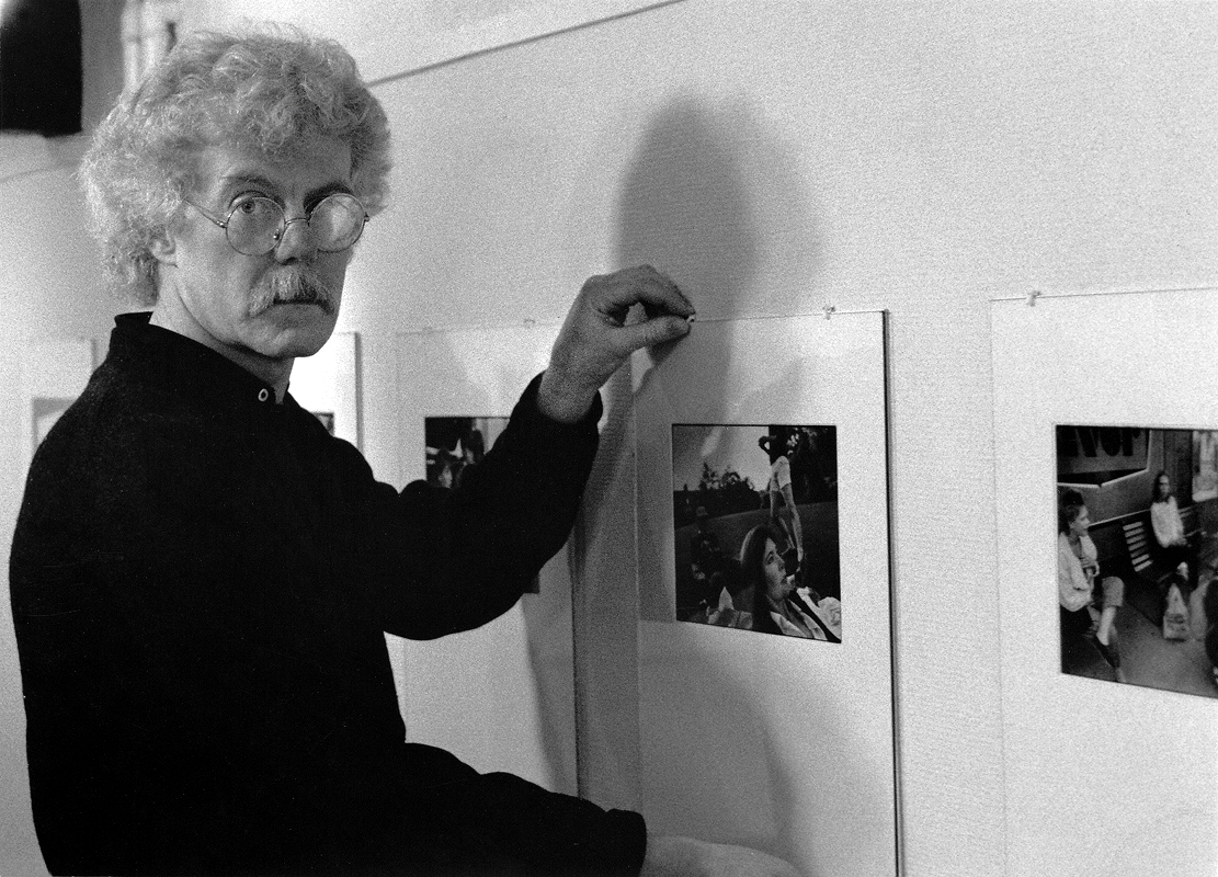 Ralph Nykvist - 1987 Malmö